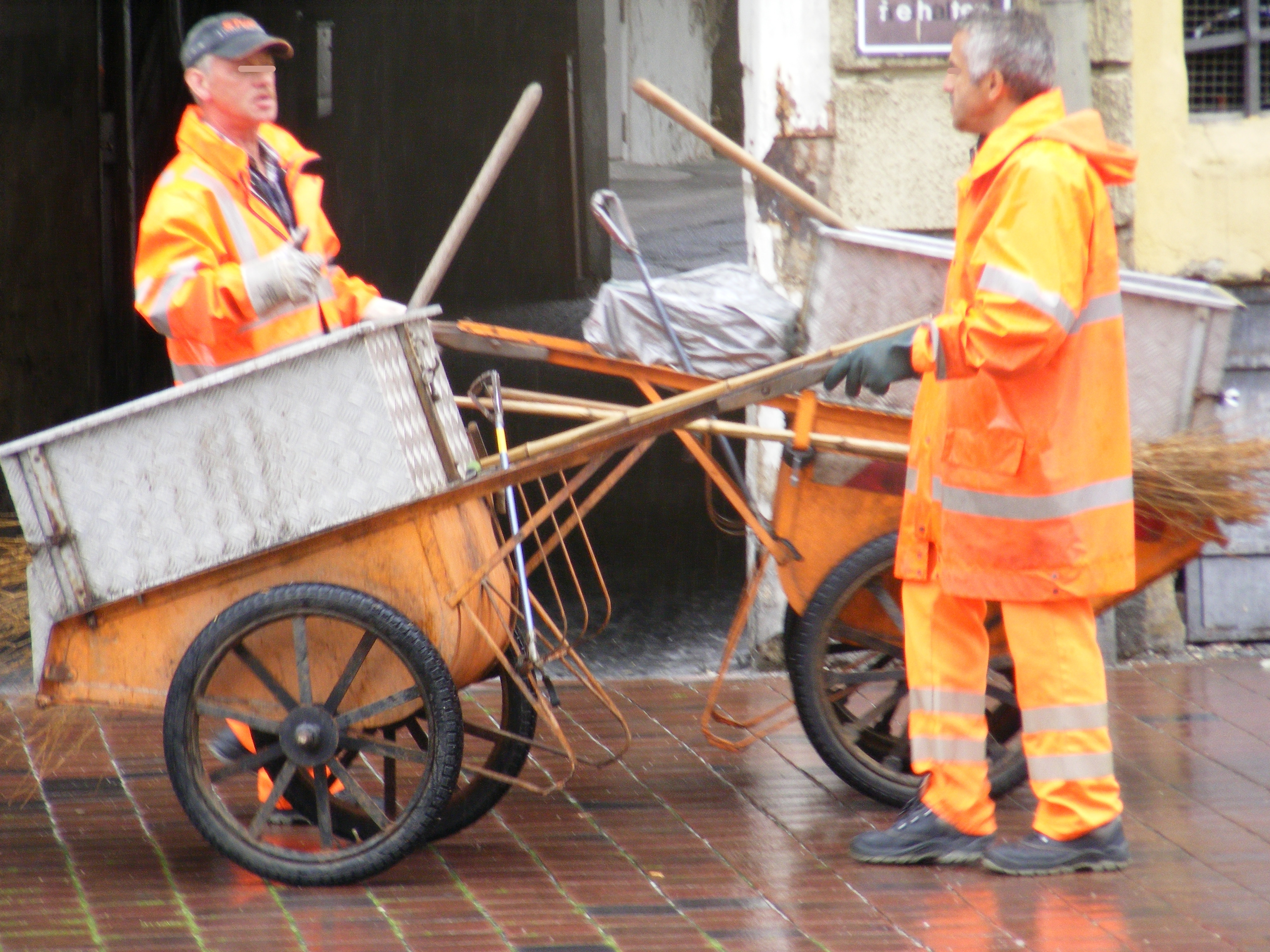 Landshut - Zwei Straßenfeger mit Sturzkarre